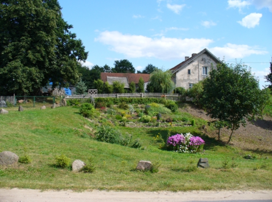 Jeziorowskie